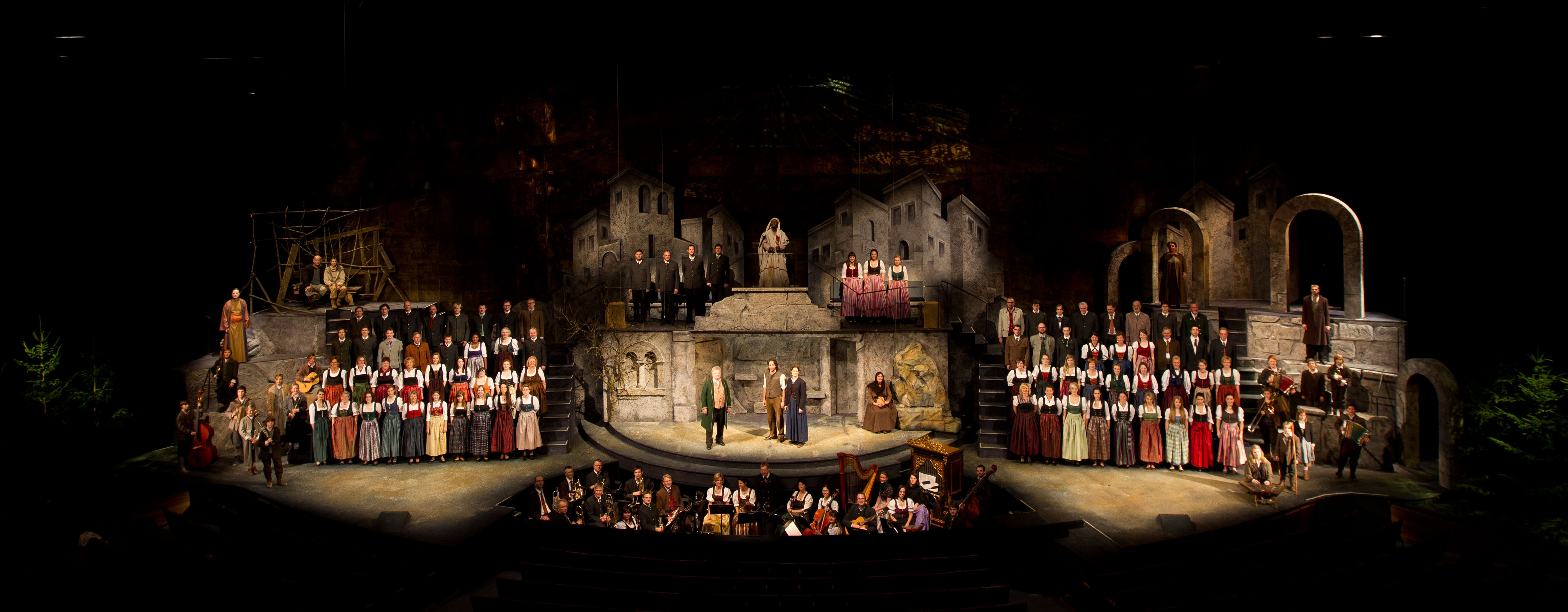 Das Salzburger Adventsingen im Großen Festspielhaus 2011